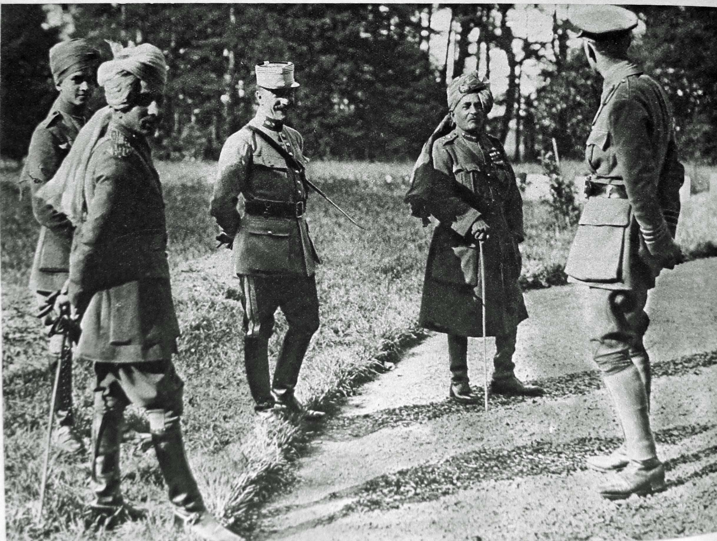 Le Miroir N°_138, page_4_: Pertab_Singh_avec_son_fils_et_un_Rajah. Un officier anglais et un auter français.